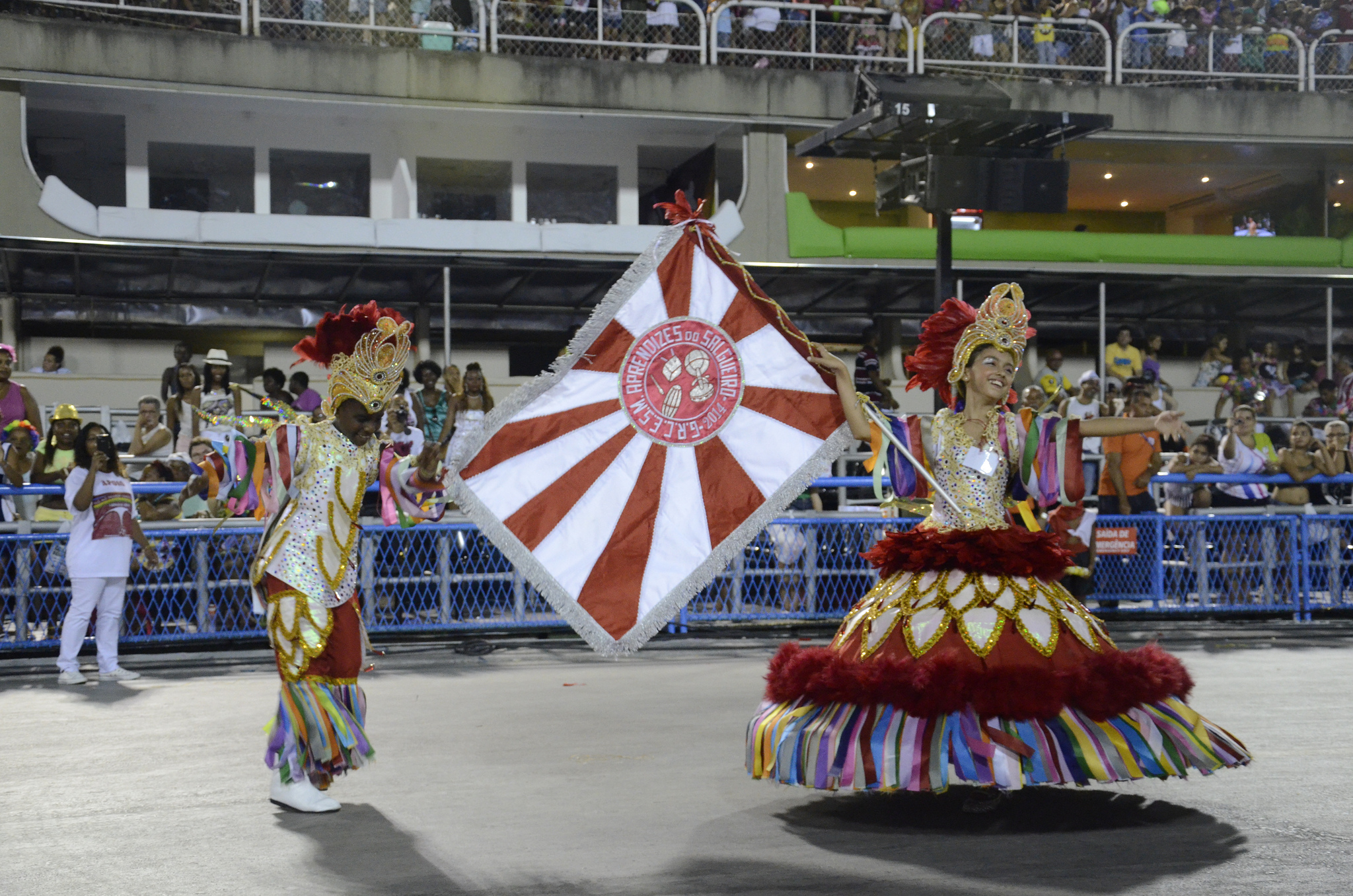 Rio de Janeiro - Pequenos sambistas fecham desfiles na Marquês de Sapucaí.